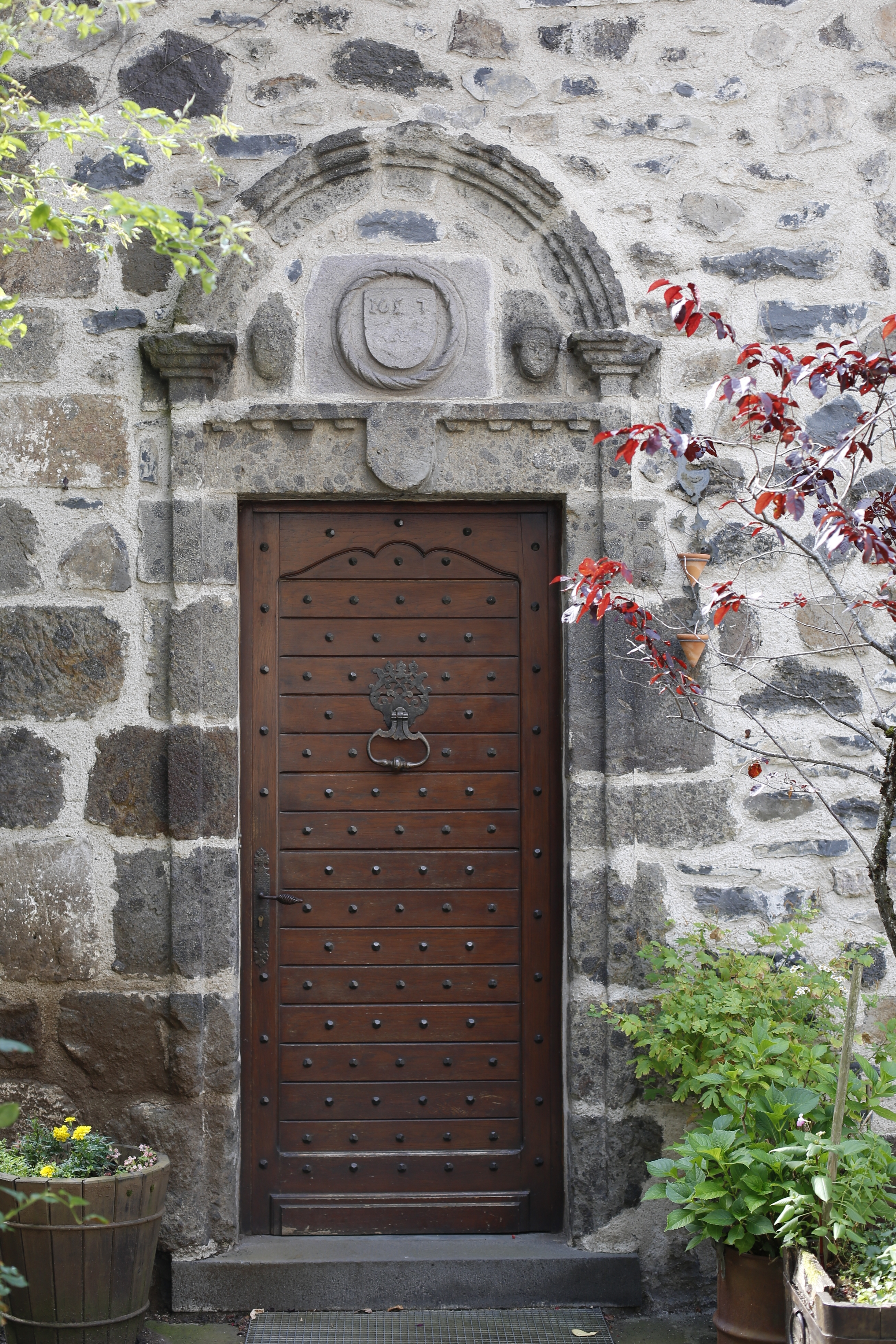 Maison Escure, maison du XVIIe siècle, rue Martille à Salers. .